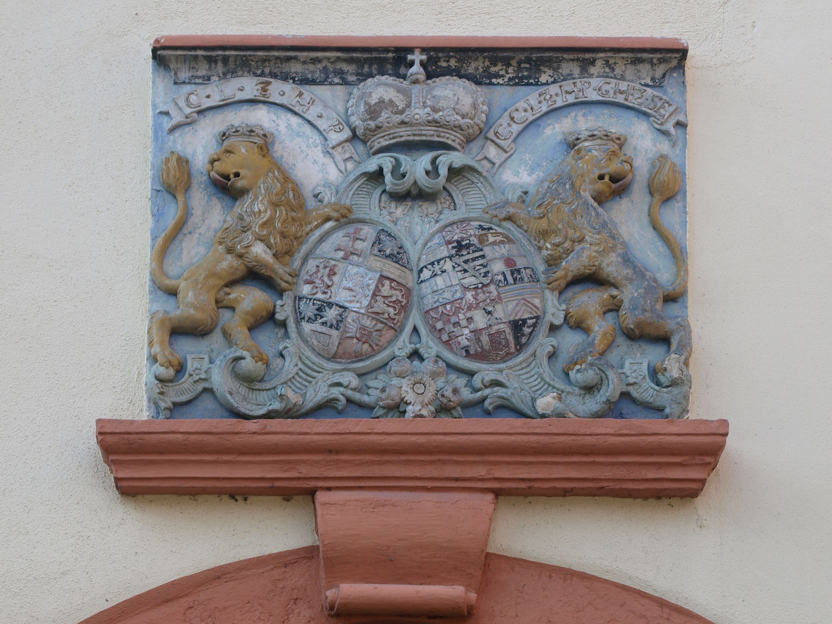 Allianzwappen über einem Tor im Südflügel, Links von Landgraf Karl von Hessen-Philippsthal und Rechts von Katharine Christine von Sachsen-Eisenach